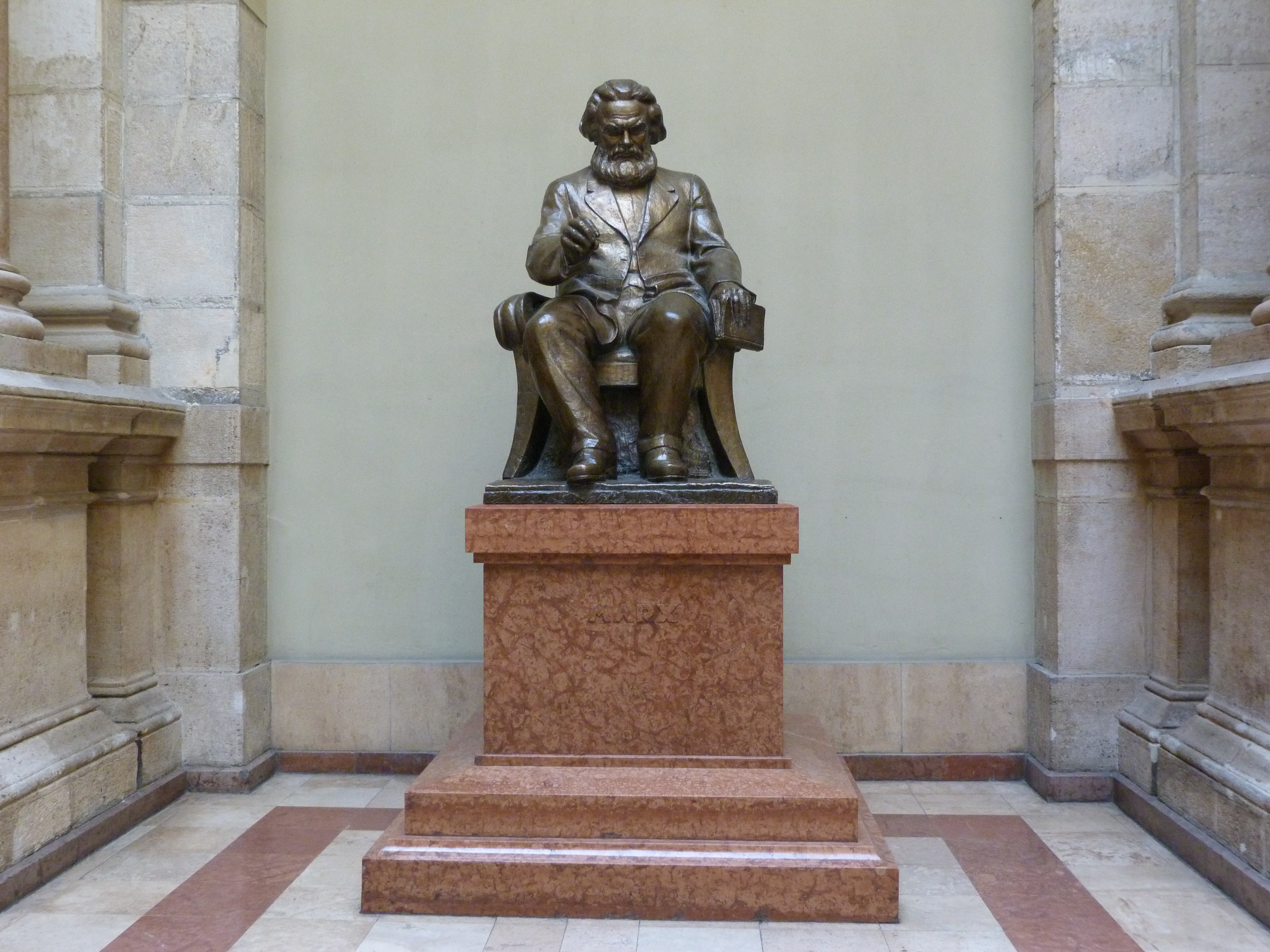 Budapest, a Budapesti Corvinus Egyetemen Aulájában. Alternatív elnevezés: Karl Heinrich Marx (Farkas Aladár, 1959 (eredetileg: 1957)) A Marx Károly Tudományegyetem majd Corvinus Egyetem Aulájában álló Marx Károly szobrot a felvétel készítését követően, 2014 év végén elszállították. Az egyetem rektora és a Hallgatói Önkormányzat által kiadott Közgazdász című lap XVI. évfolyama 2 számában foglaltak szerint (Corvina pótolja majd a Marx-szobrot) a "Hagyomány és megújulás" című pályamű nyerte meg a Corvinus Egyetem új szimbólumainak kidolgozására kiírt pályázatot. Az egyetem egyetemtörténeti kiállítására elszállított Marx Károly szobor helyére ezt a kompozíciót helyezték (Kotormán Ábel Csongor és Gwizdala Dáriusz munkája). Források: Corvina pótolja majd a Marx szobrot Közgazdász LVI. évf. 2 szám